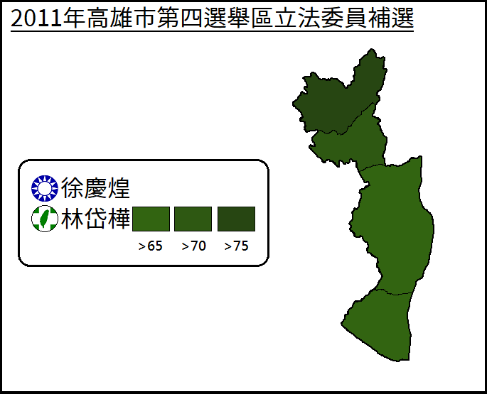 2011年高雄市第四選舉區立法委員補選得票